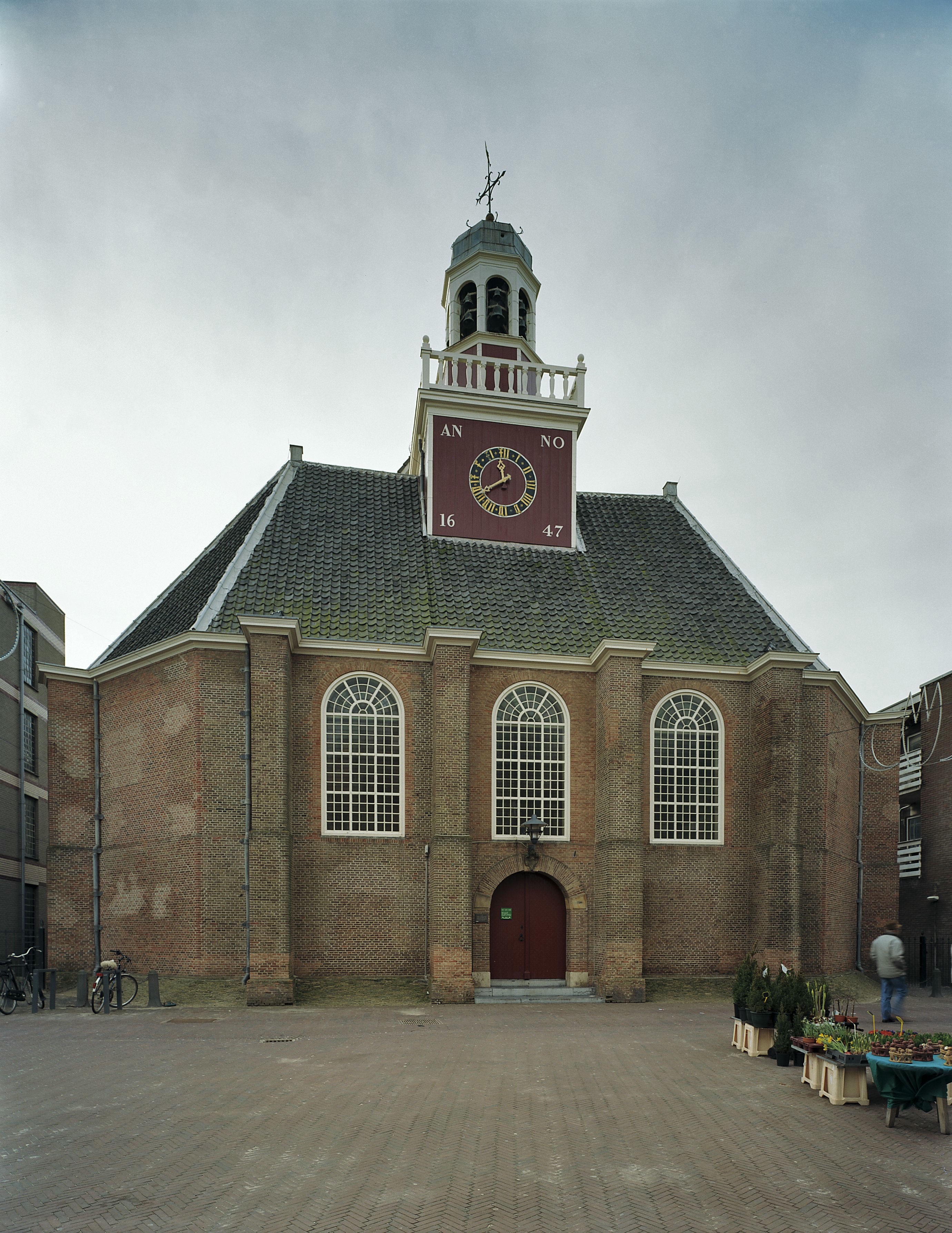 Nederlands Hervormde Kerk: Overzicht westgevel met ingangspartij (opmerking: Gefotografeerd voor Monumenten In Nederland Zuid-Holland)